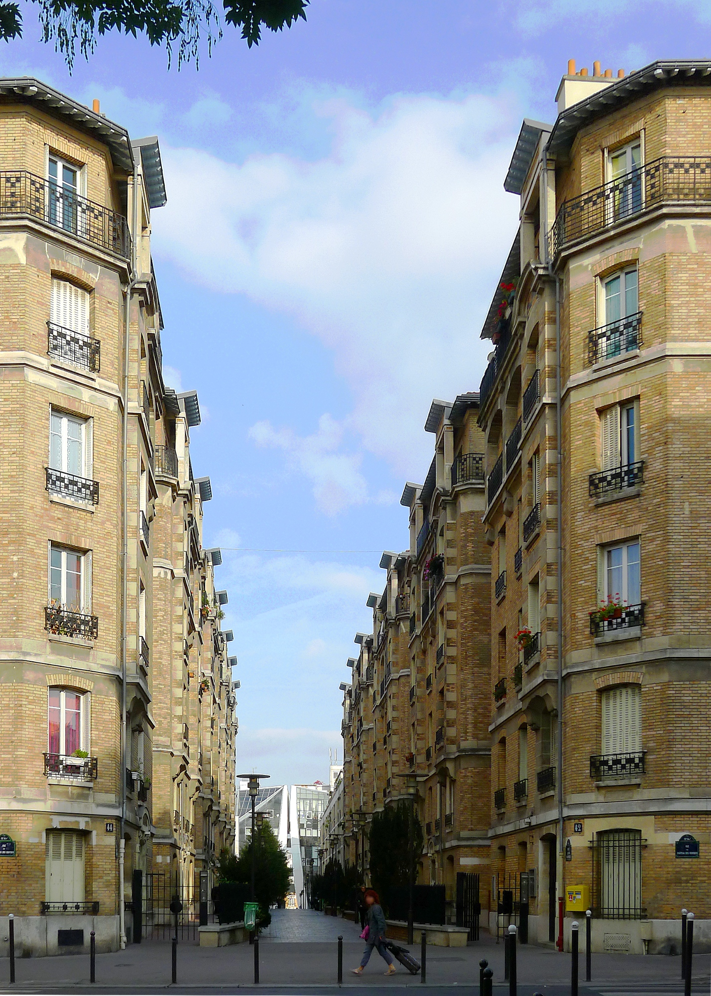 Rue Jean-Fautrier - Paris XIII